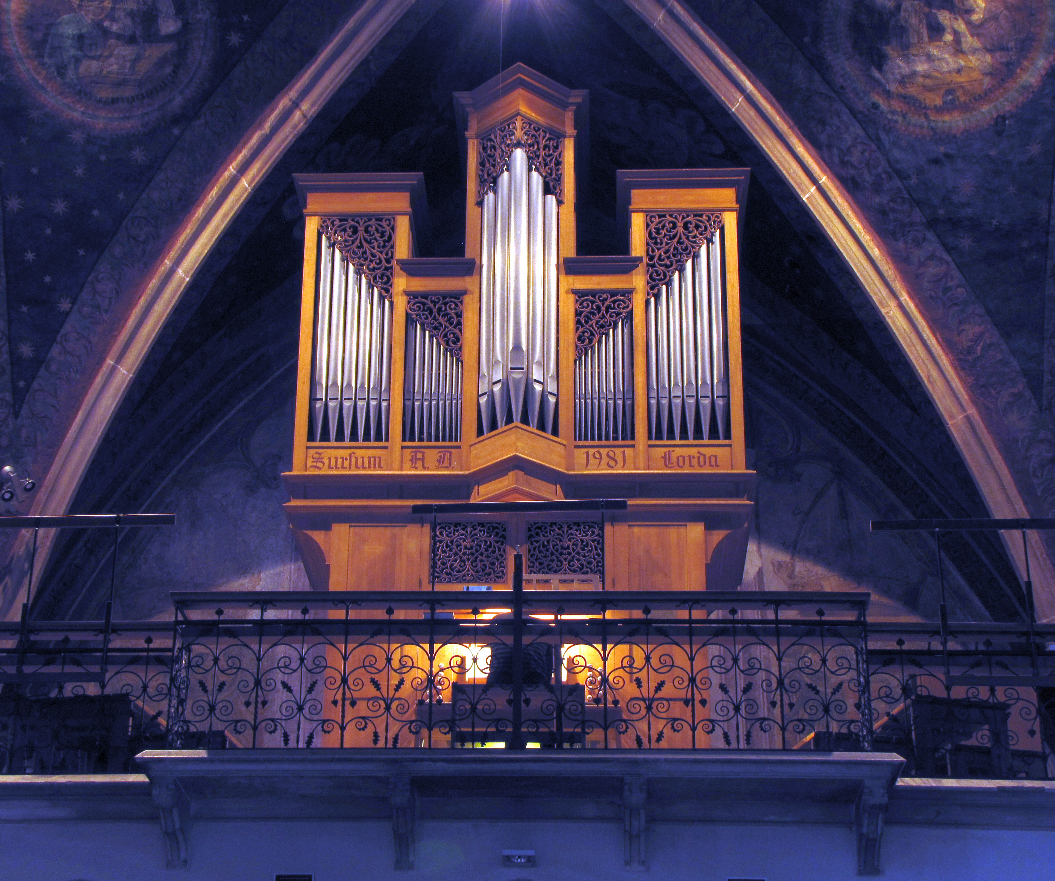 Orgel der Pfarrkirche Maria Himmelfahrt in Terlan